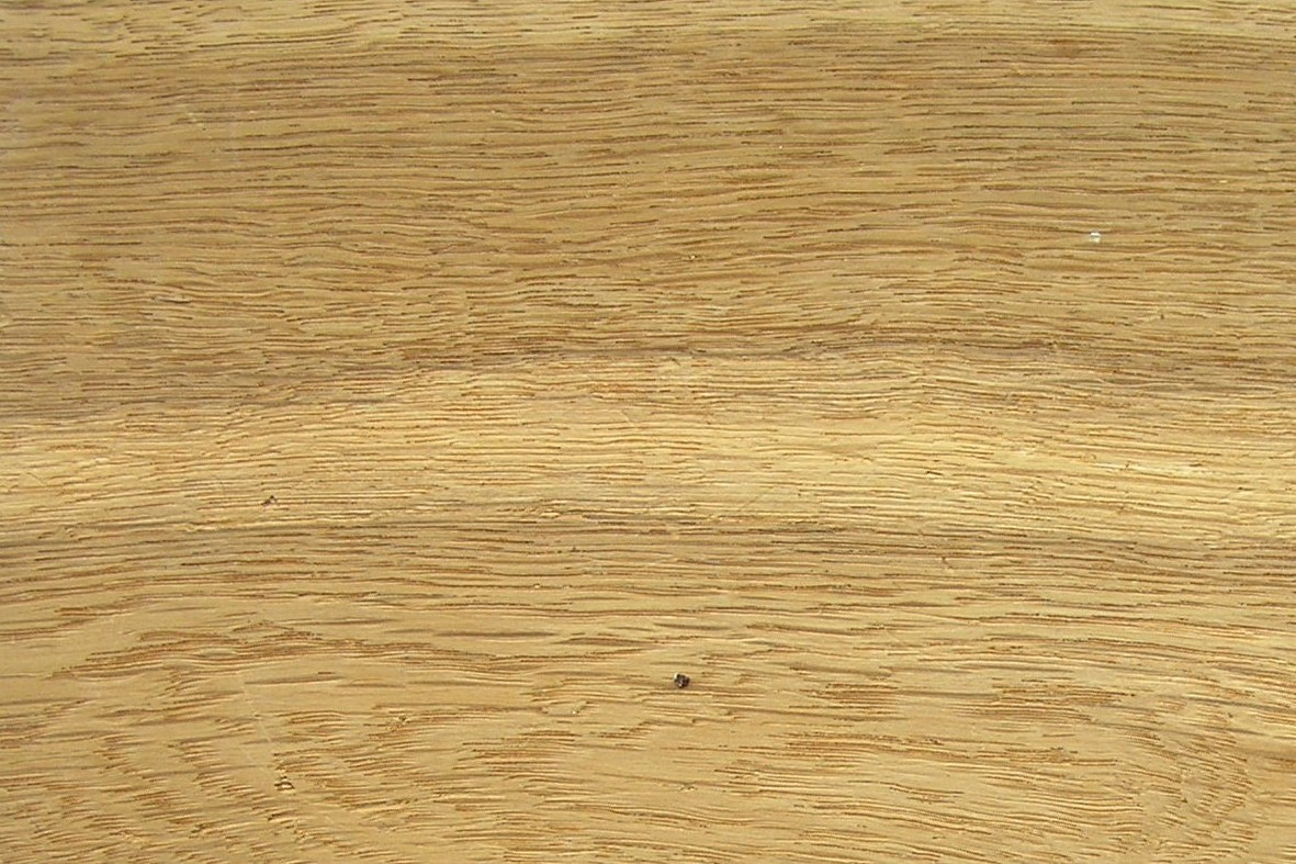 Eichenholz hell